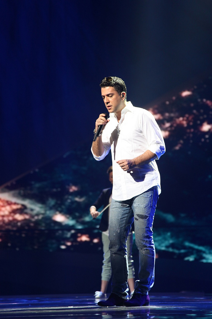 Zeljko Joksimovic